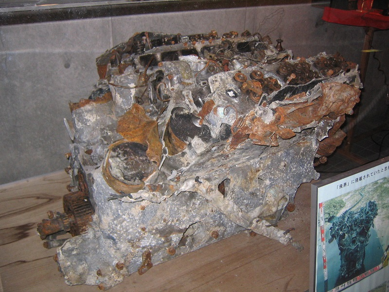 川崎航空機 ハ40 三式戦闘機 いきいきランド交野